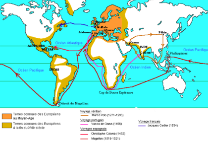 Carte sur les grandes découvertes